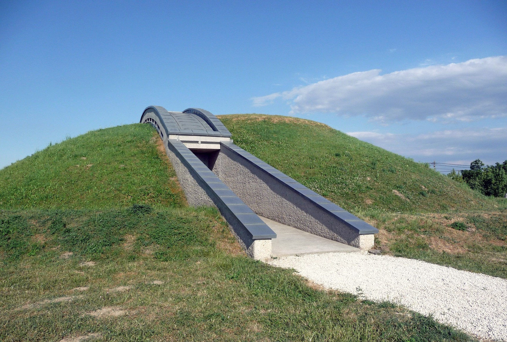 A bemutatásra feltárt 115. számú halomsír a százhalombattai régészeti parkban. A régészeti park a Matrica Múzeum része az ún. őskori szabadtéri múzeum. A park területén öt halomsír, egy bronzkori és egy vaskori településrészlet látható. [1]